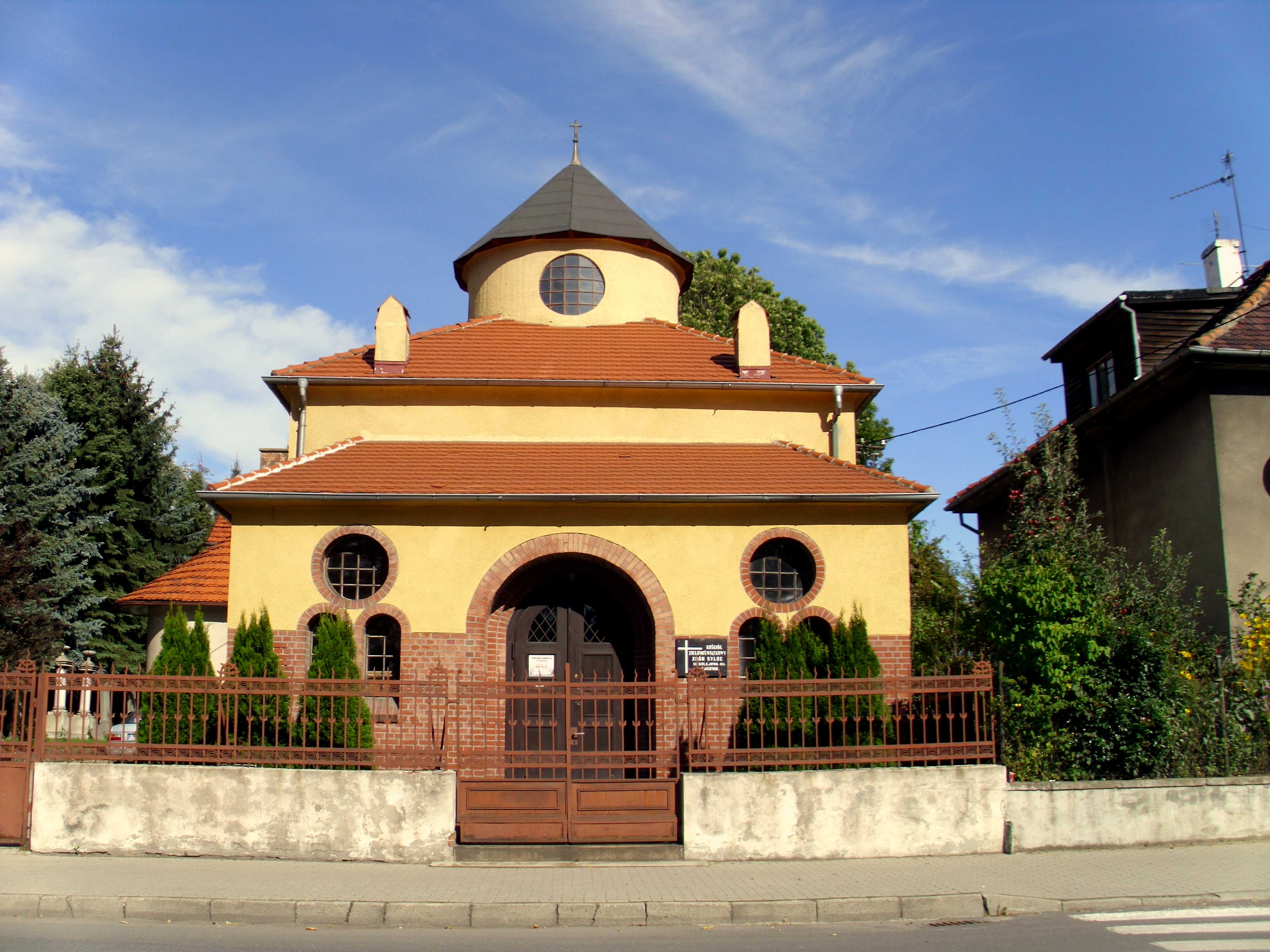 Prudnik, cmentarz żydowski, k. XIX, bożnica, kon. XIX, Kościół Zielonoświątkowy Zbór Syloe 03.1977.